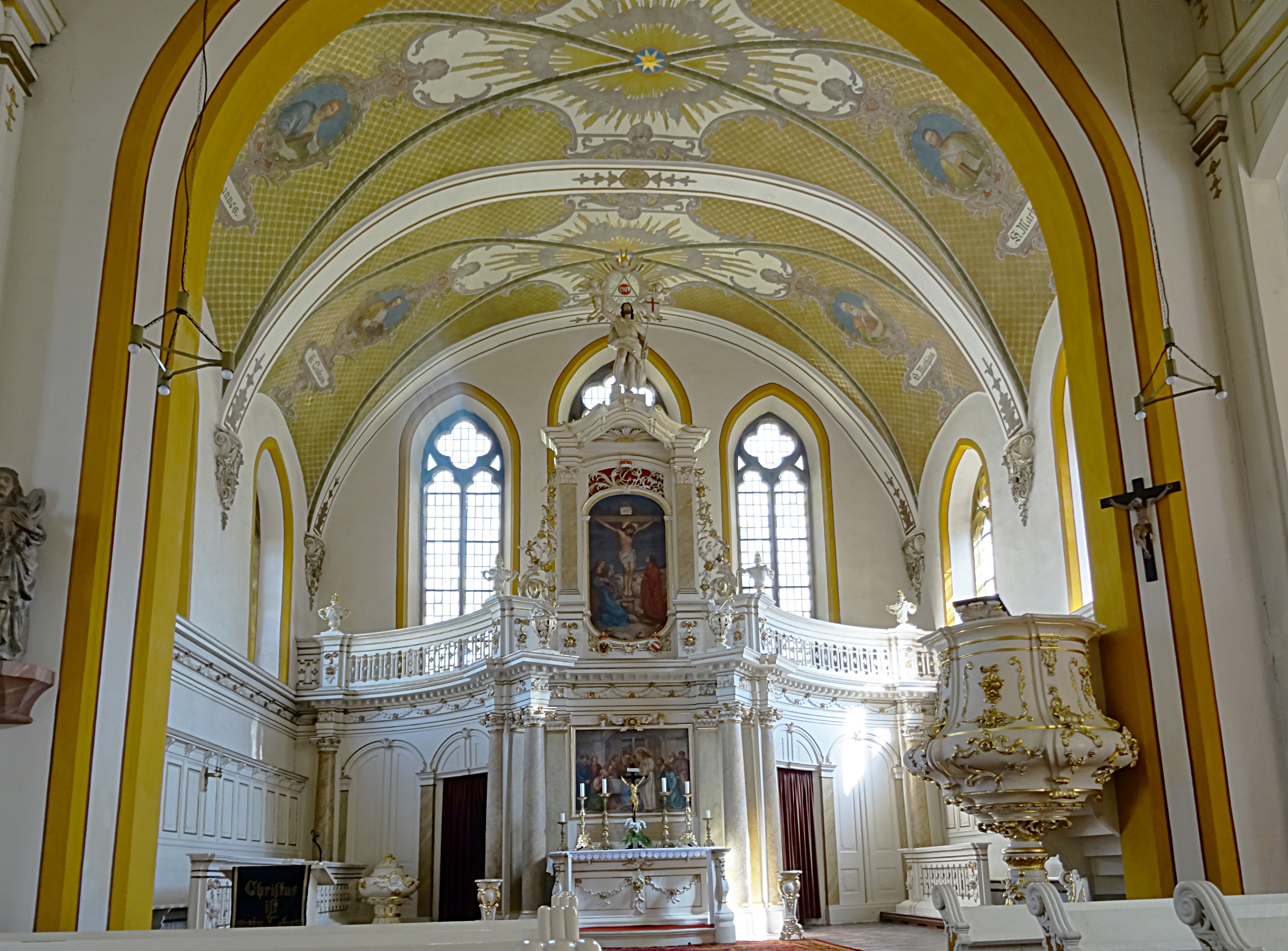 Stadtkirche St. Marien Stadtilm, Altarraum